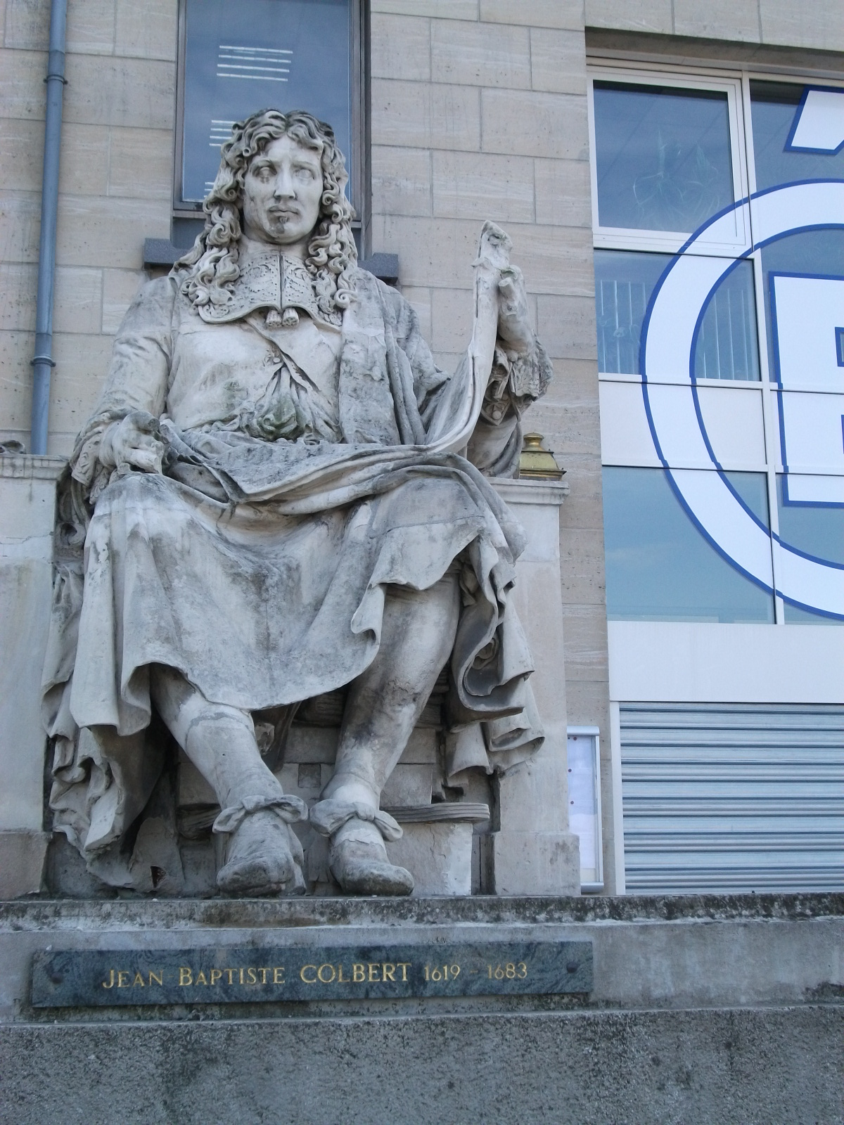 Statue de Jean-Baptiste Colbert devant le Rectorat de l'académie de Reims se trouvant rue Navier à Reims.